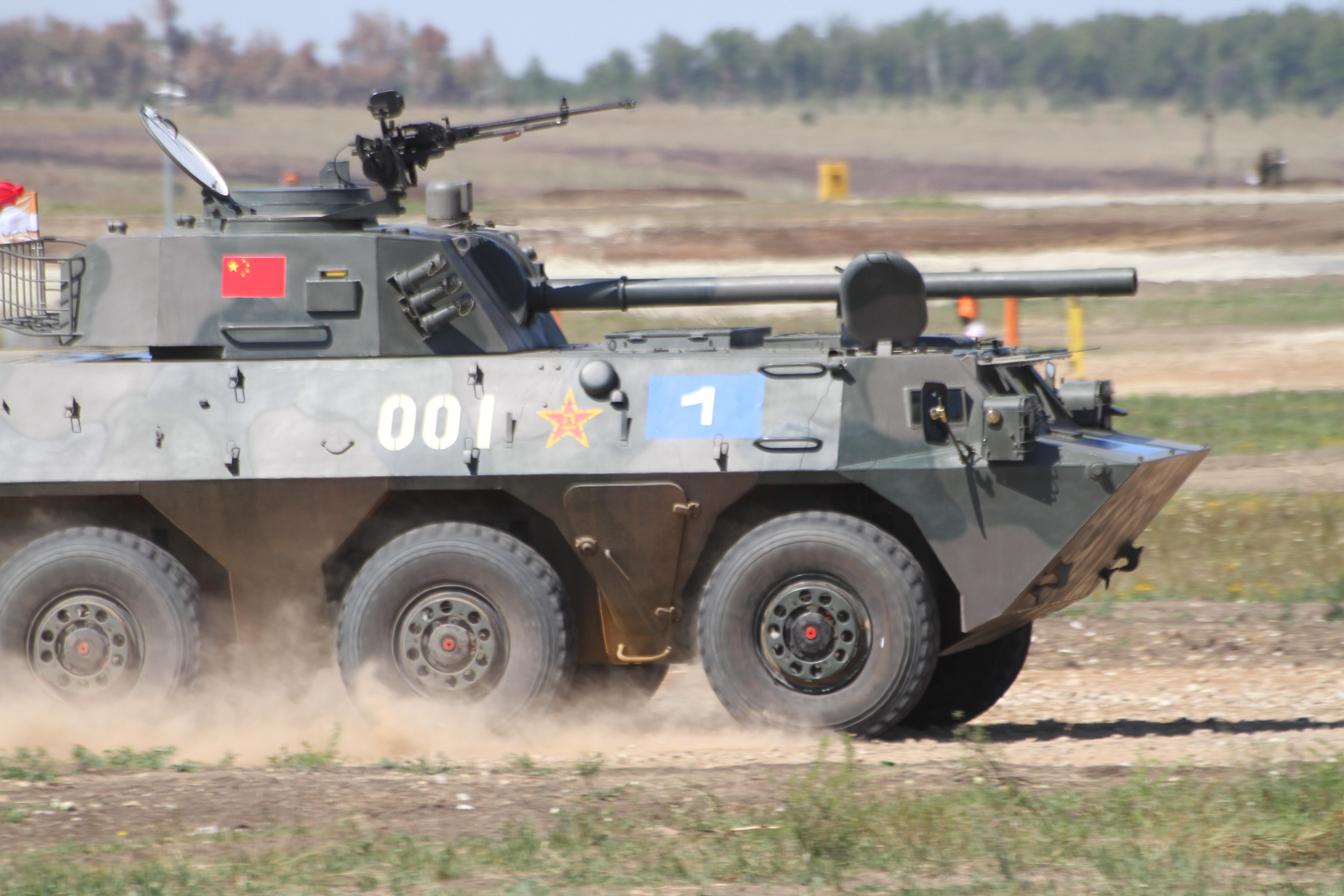 Расчёт из Китая на марше. Состязания конкурса "Мастера артиллерийского огня".